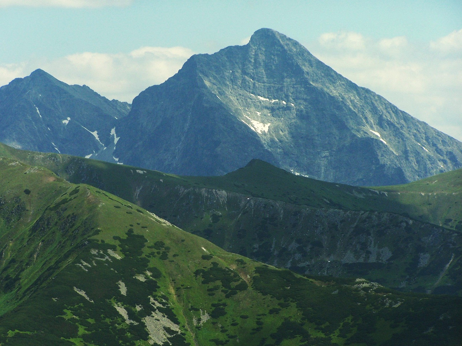 Krótka i Krywań, widok z północnej strony